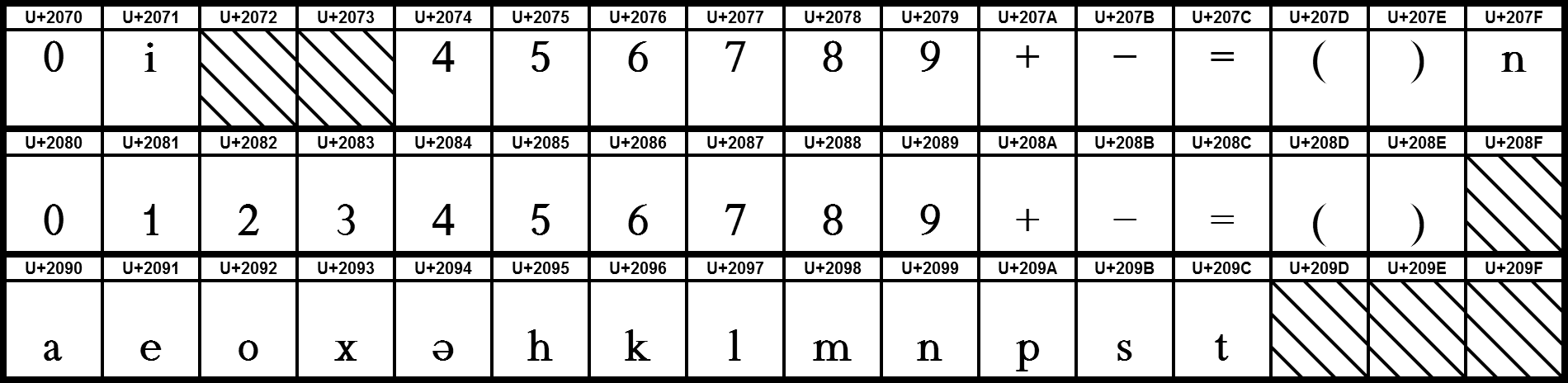 Grafiktafel für den Unicodeblock Hoch- und tiefgestellte Zeichen. Schraffierte Felder sind unbesetzte Codepoints.